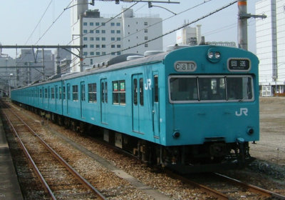 国鉄103系電車。 2006年03月27日、姫路駅にて來灯（らいとー）が撮影。 画像の詳細 撮影者 ：來灯（らいとー） 撮影日時 ：2006年03月27日 撮影場所 ：姫路駅 画像の詳しい説明：JR播但線で使用されている国鉄103系電車。平成18年03月18日のダイヤ改正前の、朝の通勤ラッシュの時間帯に使用されていた221系電車と置き換わって、現在使用されている。 2006年に姫路で"ゆかた祭り"が催される日には、夕方の時間帯に運転されているところを目撃。